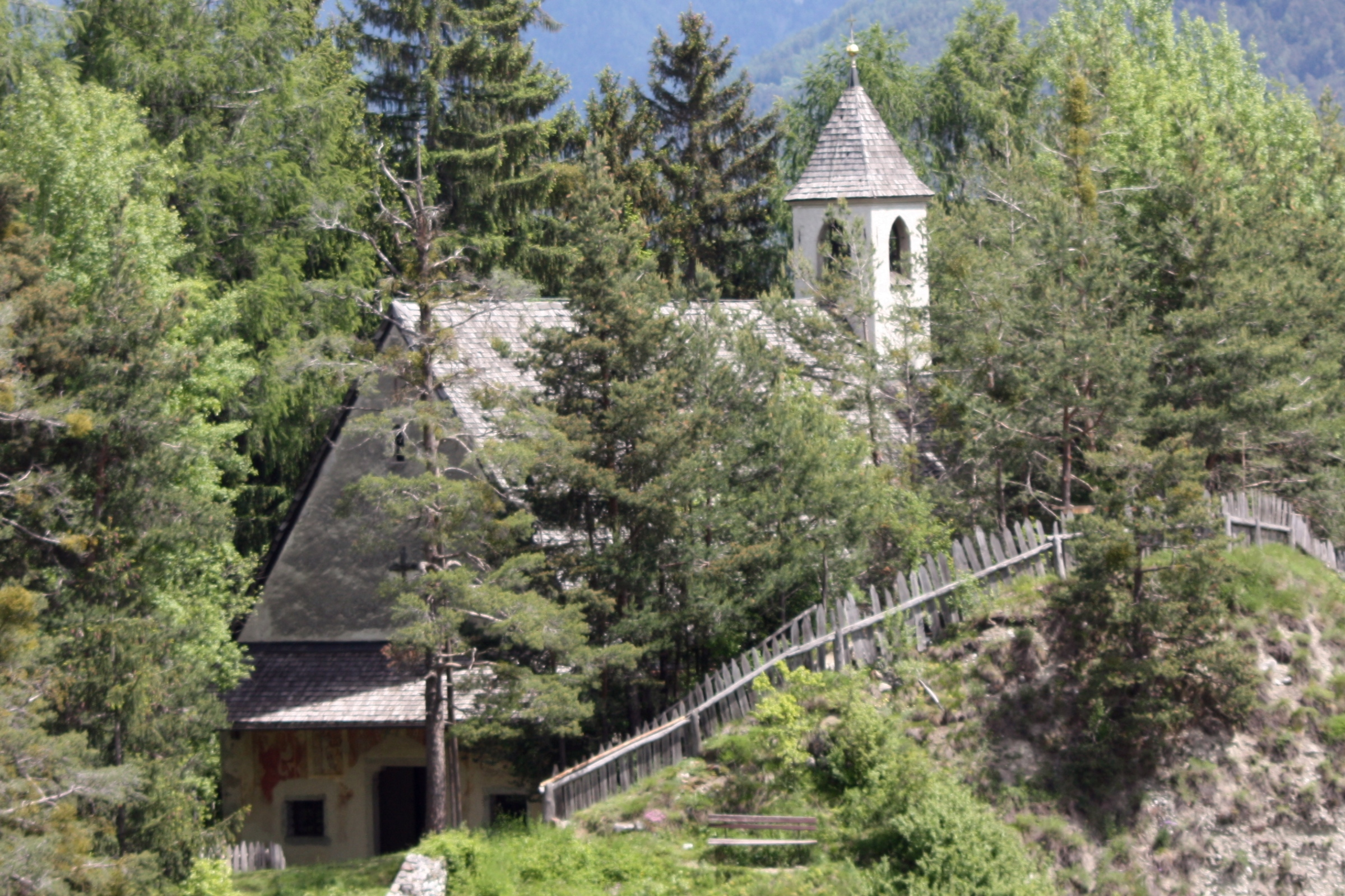 Brixen, Südtirol: Wandmalerei der Kirche St. Cyrill nahe Tils